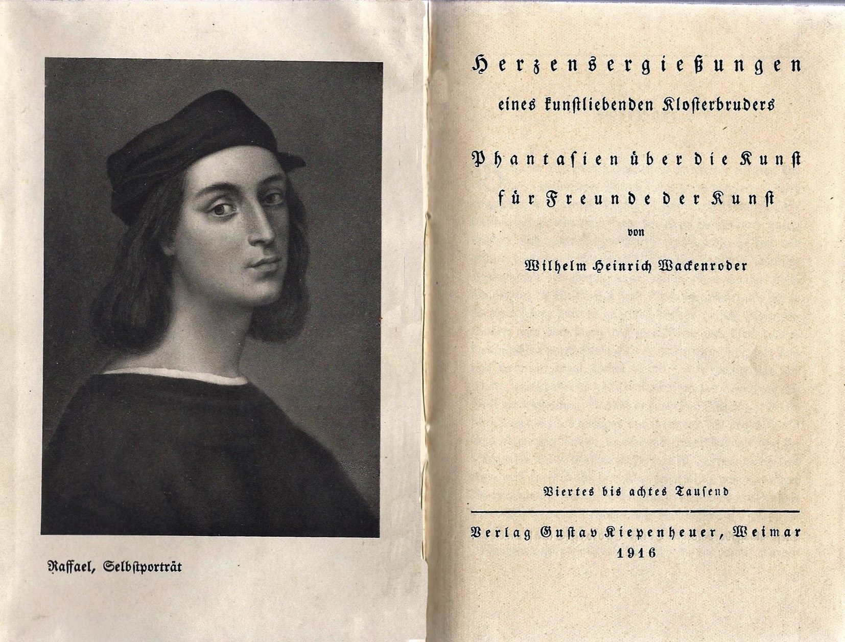 Seite 2 und 3 der Ausgabe 1916 bei Kiepenheuer in Weimar von Wilhelm Heinrich Wackenroder, Herzensergießungen